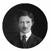 Valentyn Sadovsky